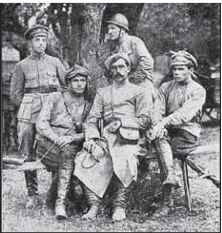 Командир Південної повстанської групи УНР Гулий-Гуленко в оточенні вояків.